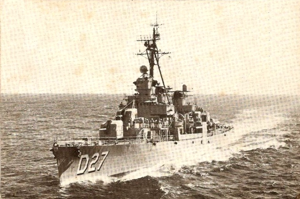 Contratorpedeiro da Classe Fletcher D27 Para. Photograph of the USS Guest (DD-472), renamed Pará (D27) in 1959 for her Brazilian navy service. She was scrapped in 1979 and sunk as a target ship in 1983.